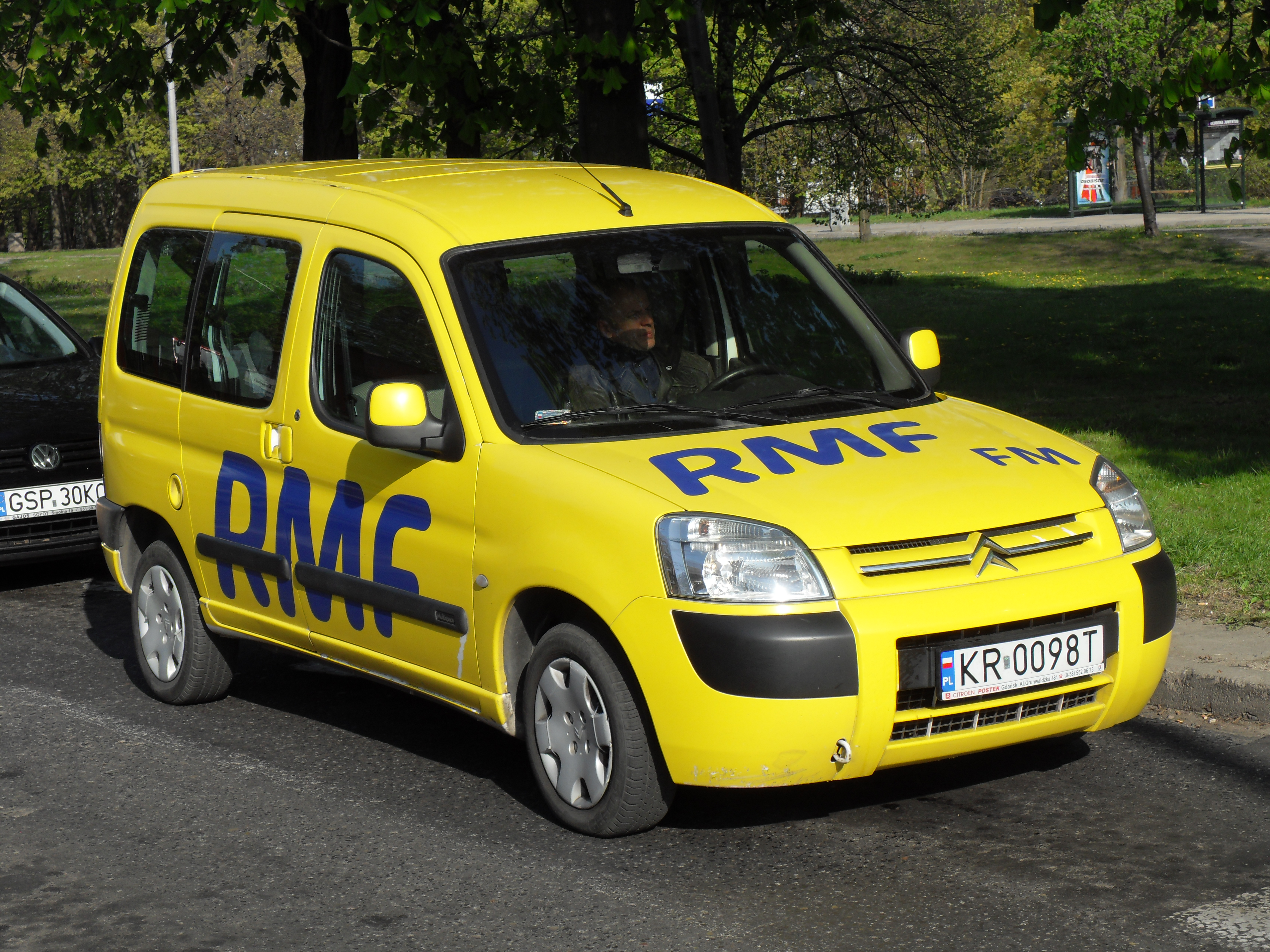 Gdańsk. Radio RMF FM, Citroën Berlingo I.